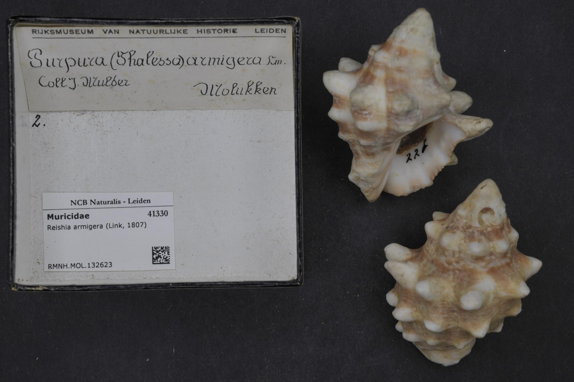 Reishia armigera (Link, 1807)